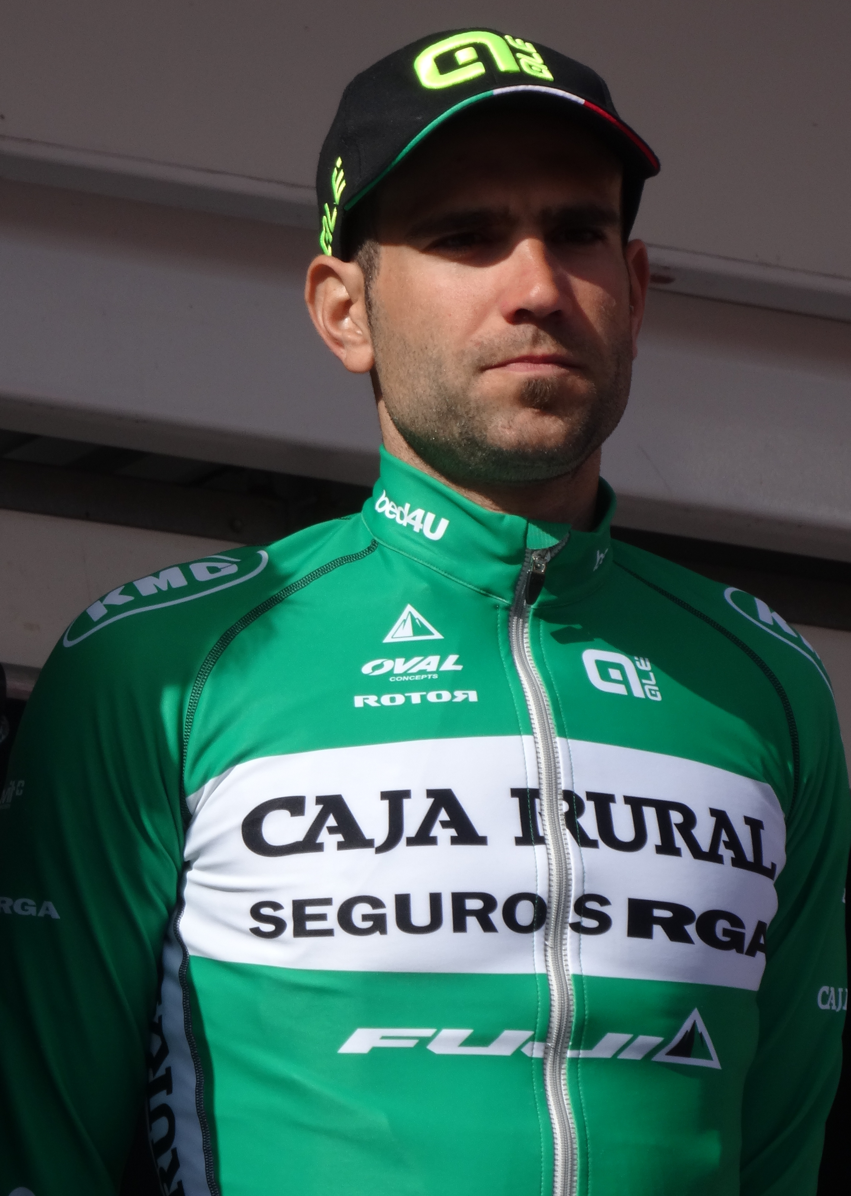 Reportage réalisé le mercredi 4 mars à l'occasion du départ du Samyn des Dames 2015 et du Samyn 2015 à Quaregnon, Belgique.